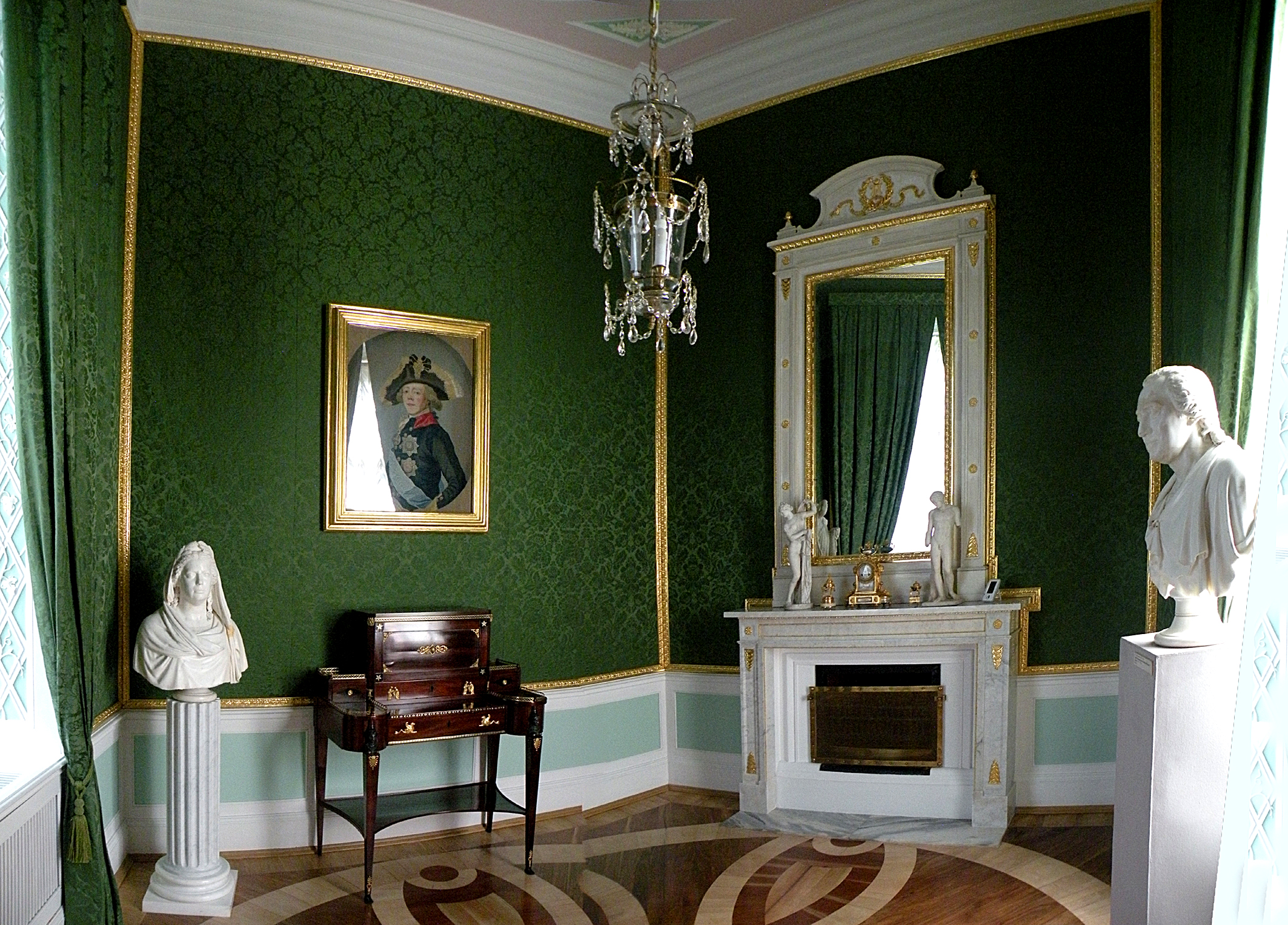 Гатчина. Большой Гатчинский дворец. Башенный кабинет.